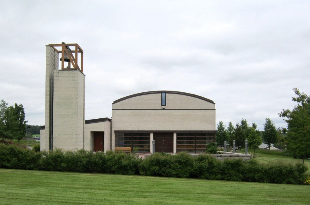 Orelund kapell, Sandefjord